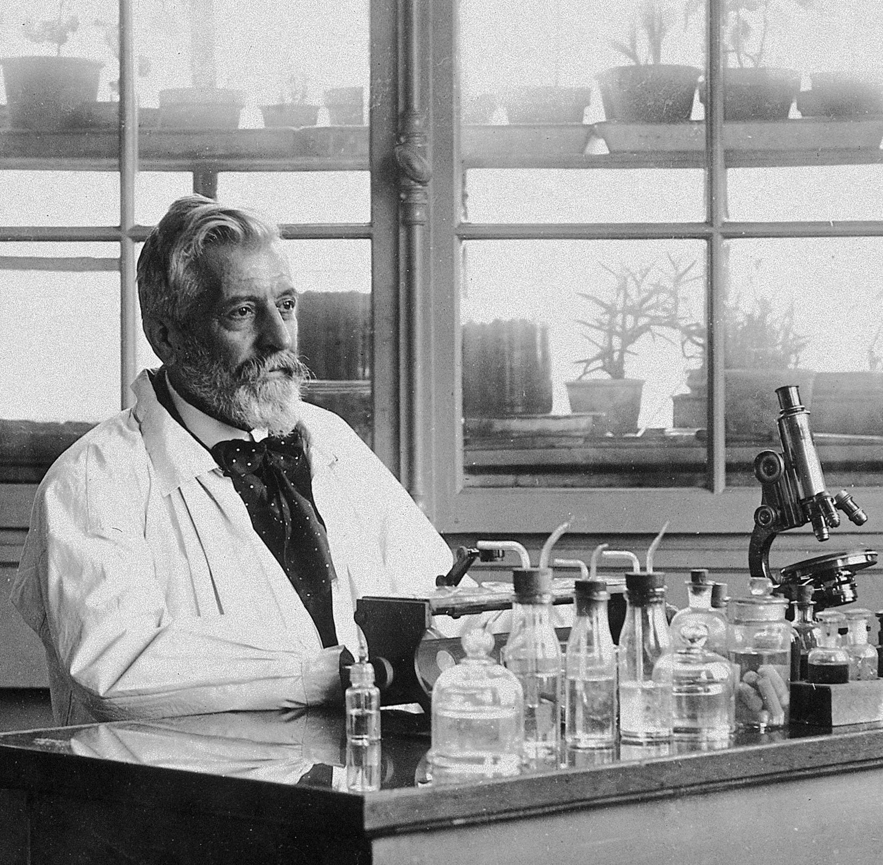 Louis Gustave Chauveaud